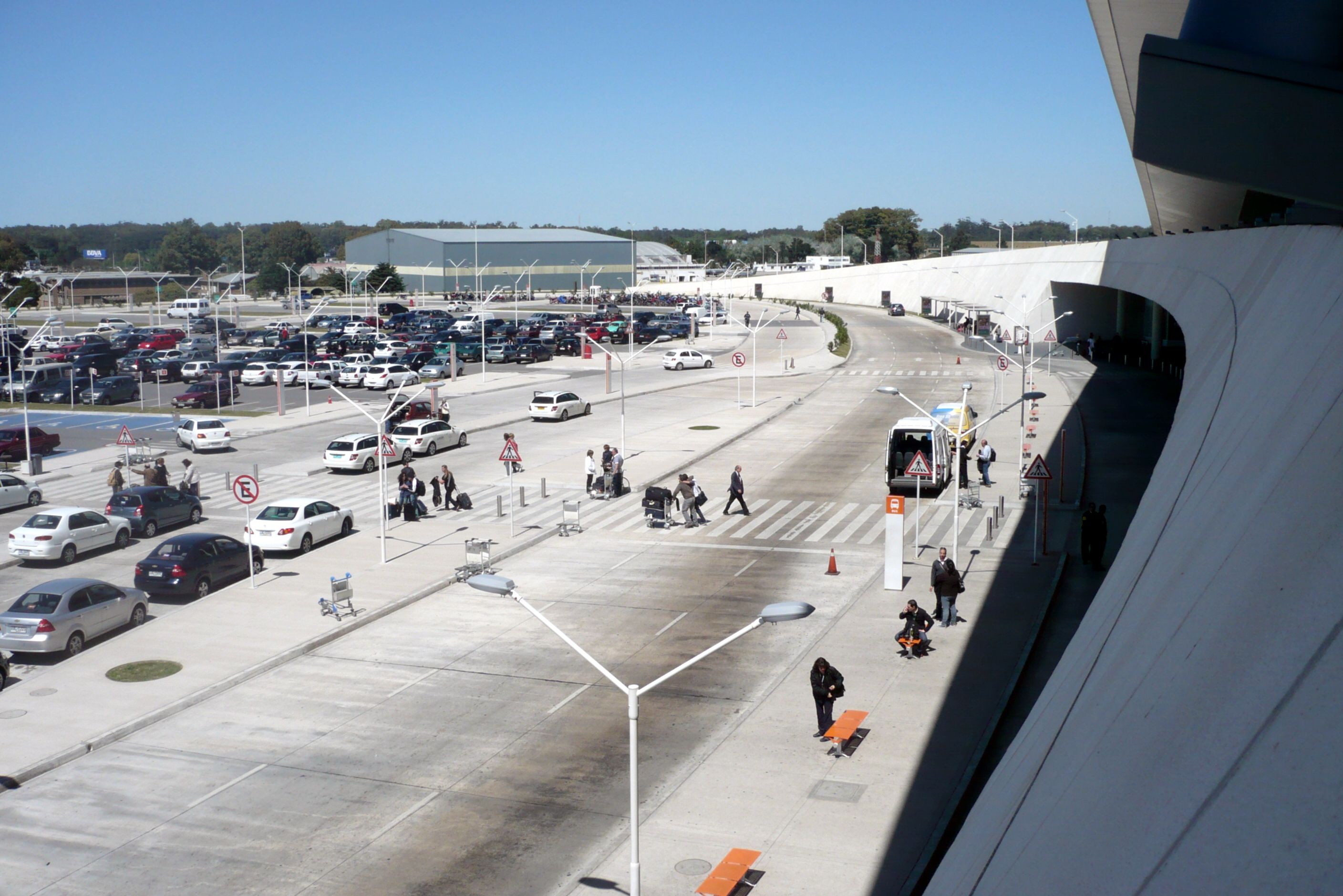 Aeropuerto Internacional de Carrasco